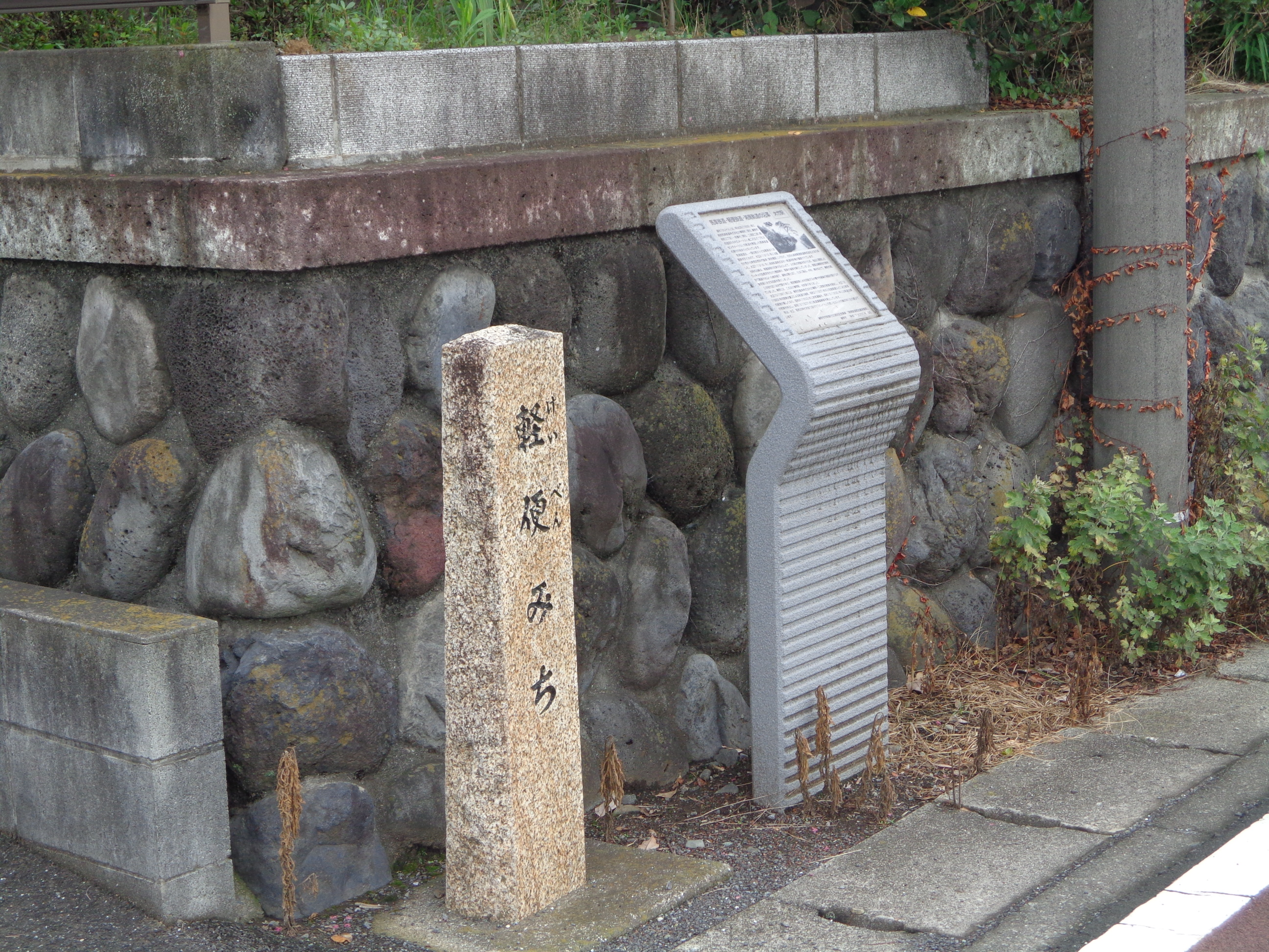 湘南軌道大竹駅跡